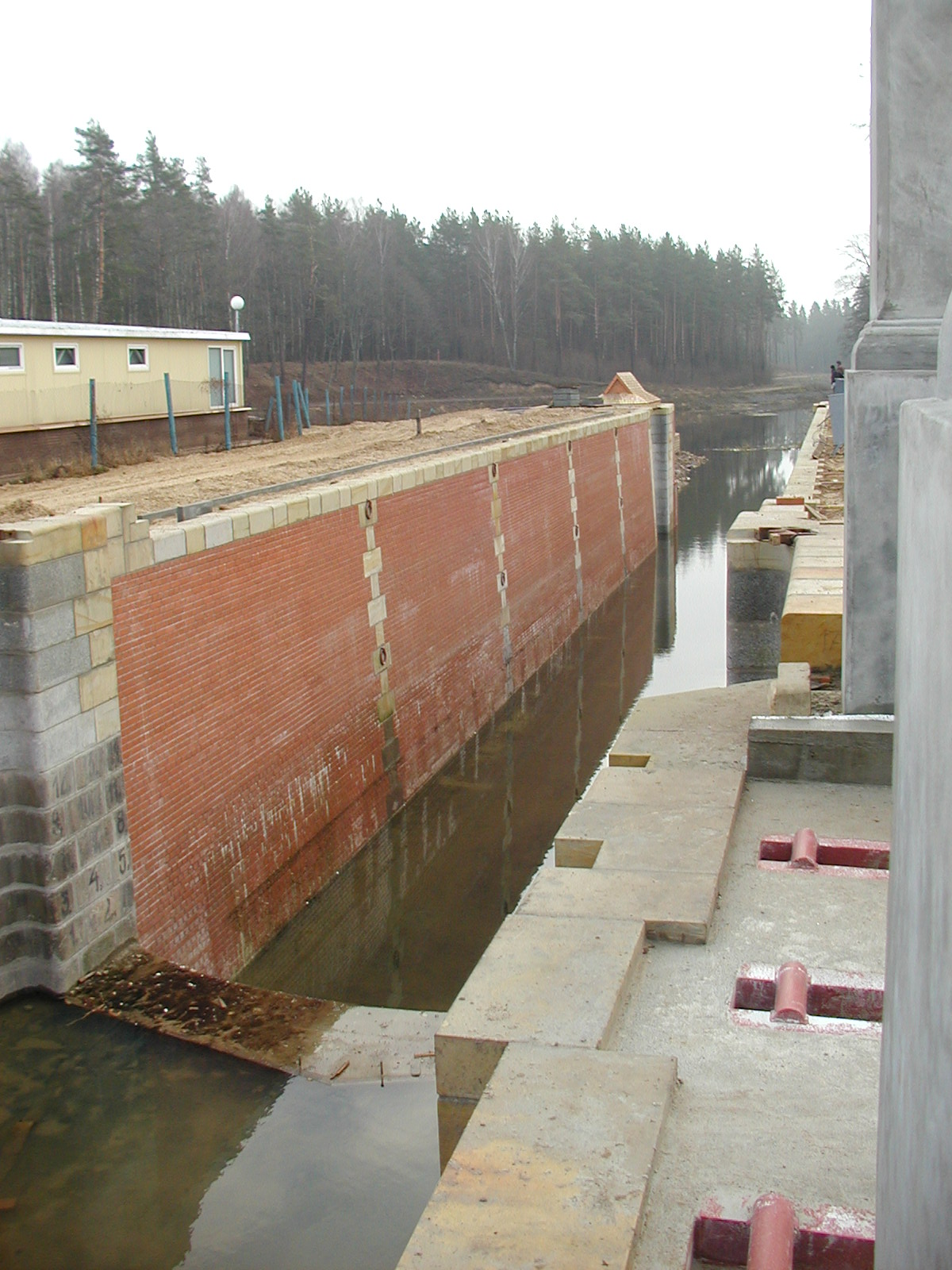 Remontowana śluza Kurzyniec, Kanał Augustowski